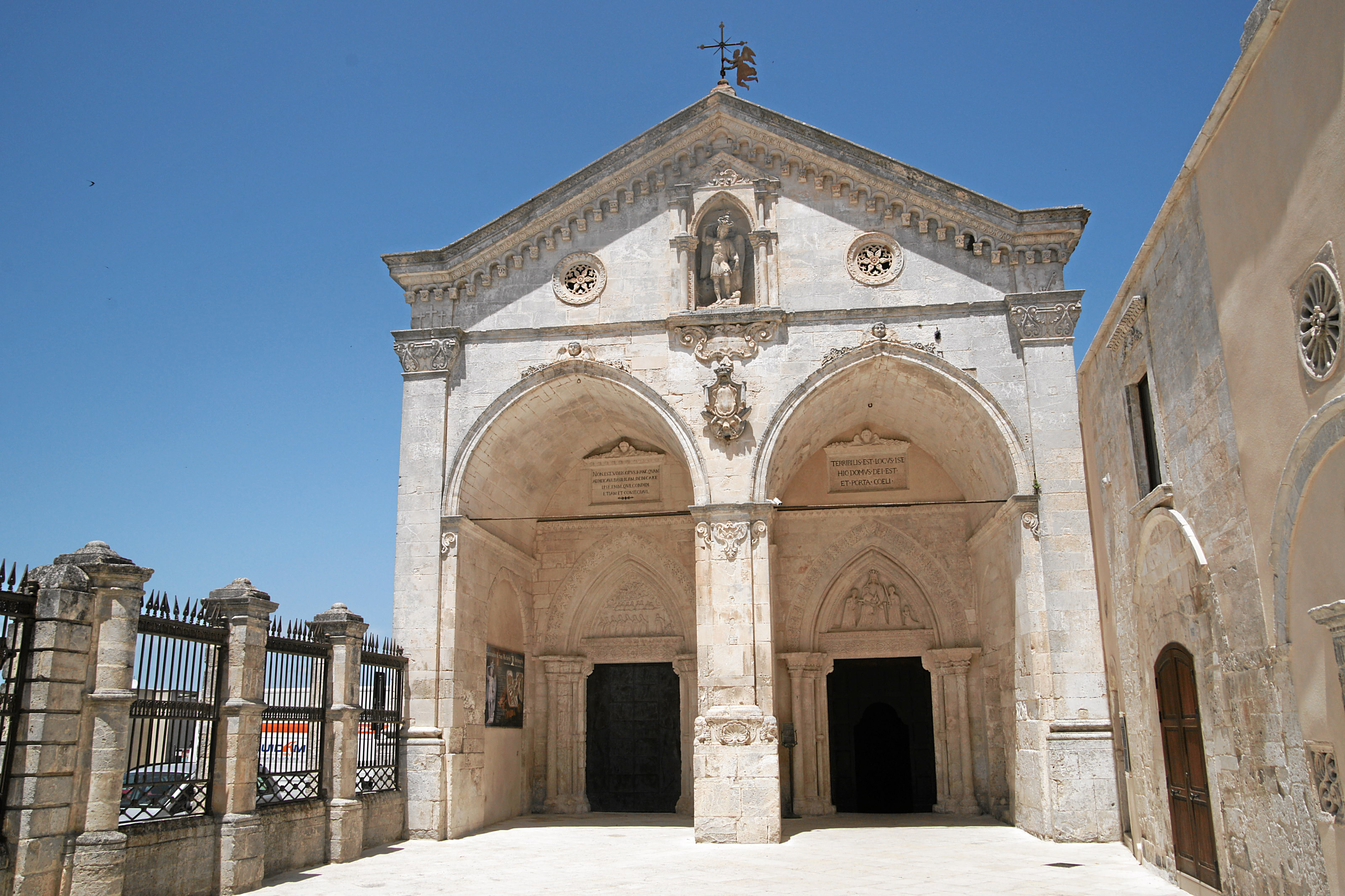 Santuario San Michele Arcangelo, Eingang